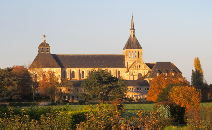 Abbaye de Saint-Benoit-sur-Loire, France